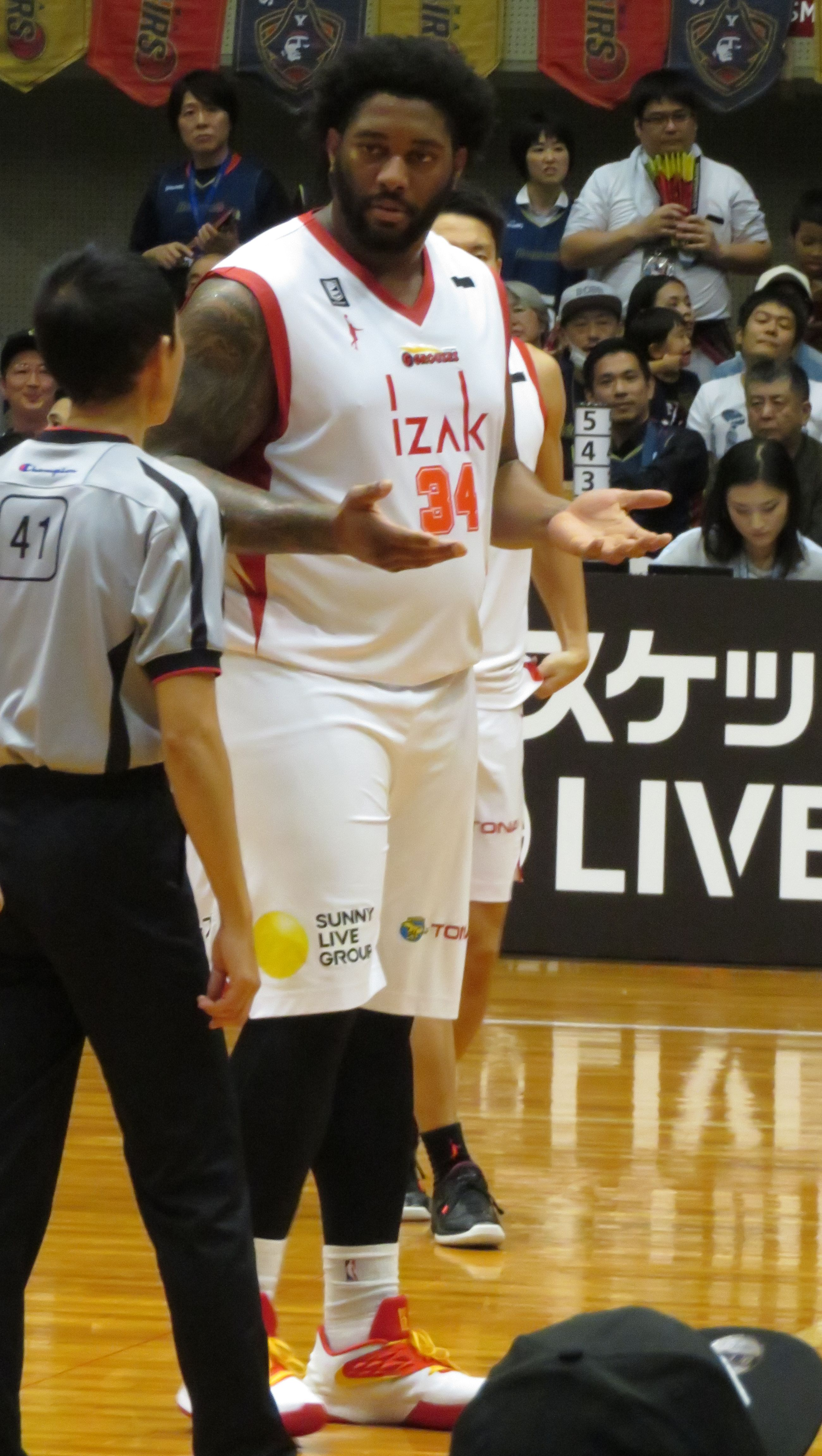 2018年10月18日撮影 2018-19 B1 第3節 横浜-富山 横浜文化体育館にて